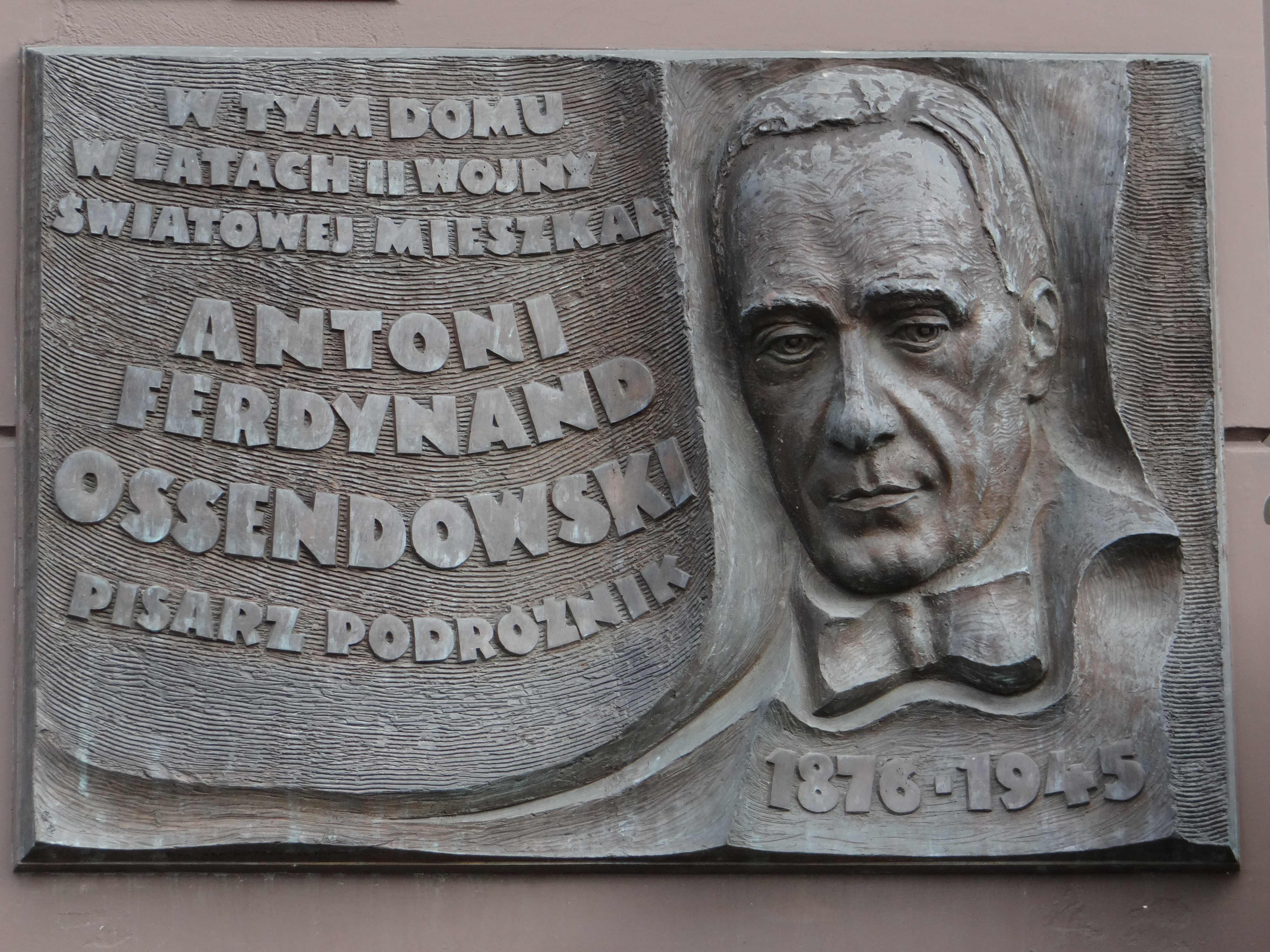 Tablica pamięci o Antonim Ossendowskim mieszkającym w kamienicy Marcina Weinfelda - Grójecka 27 w Warszawie